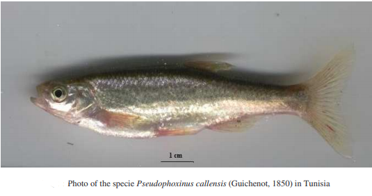 spécimen de 10 cm